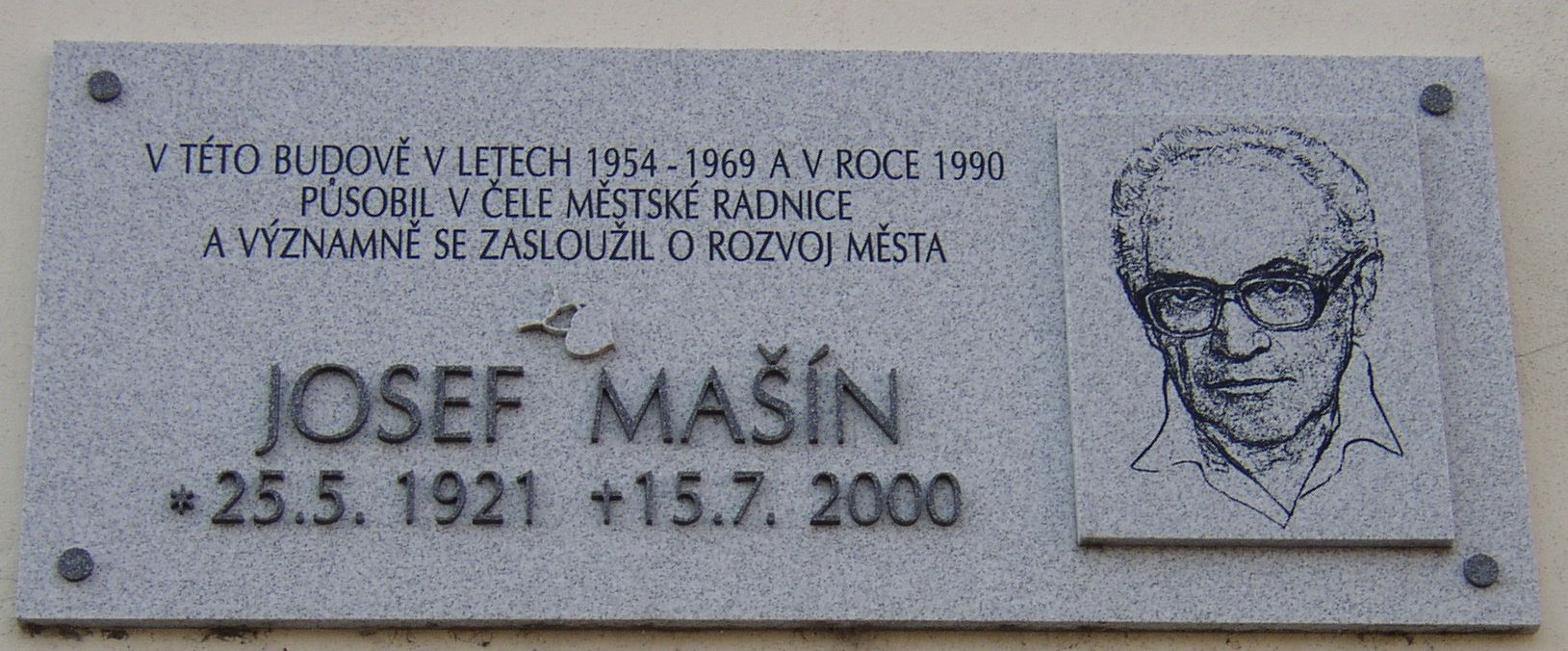 Česky: Pamětní deska Josefa Mašína na budově radnice ve Varnsdorfu.